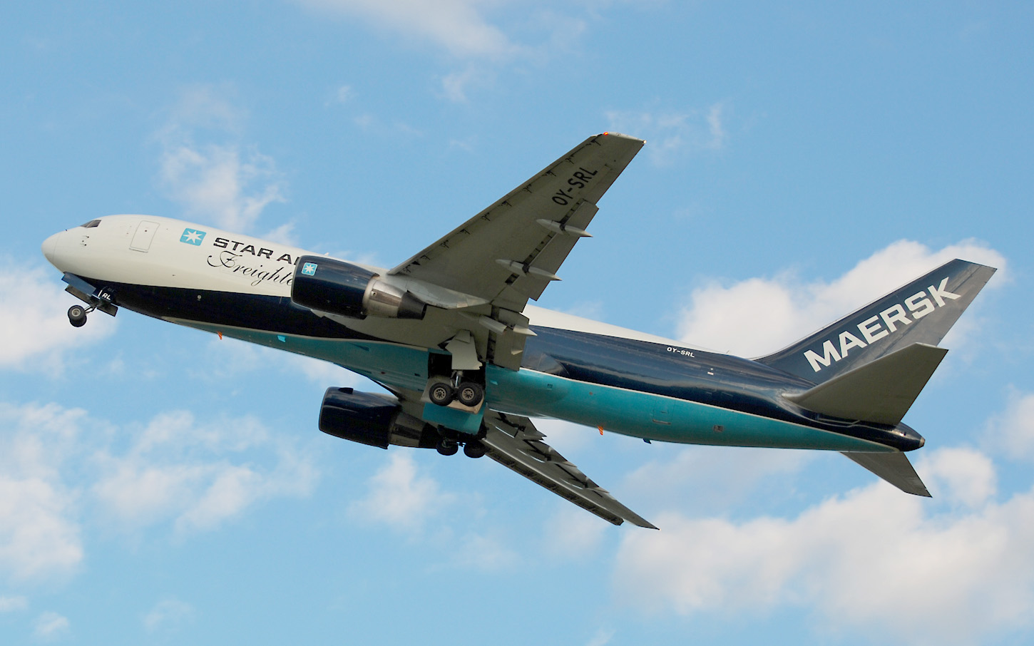 SRR - Star Air Freight Boeing 767-232 /F EGPH